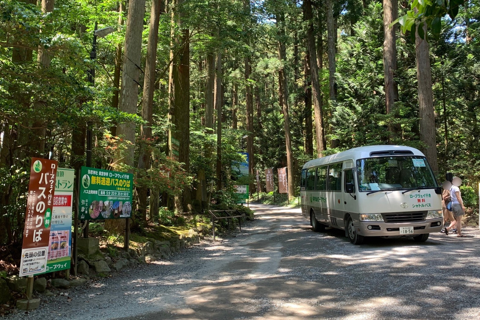 彌彦神社と弥彦山ロープウェイ 山麓駅を結ぶ無料シャトルバス（2020年6月）